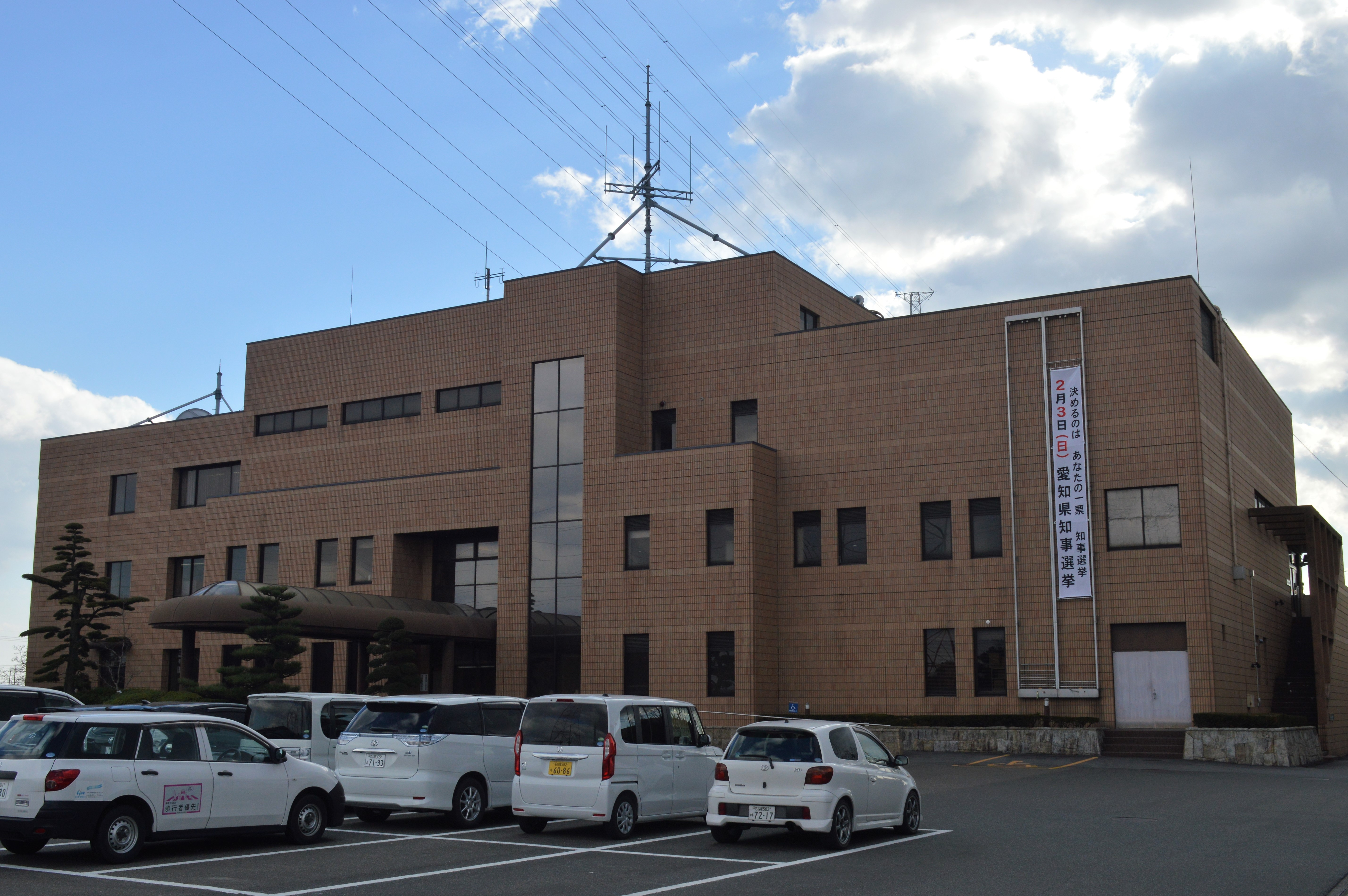 愛知県弥富市にある弥富市役所十四山支所。旧・十四山村役場。